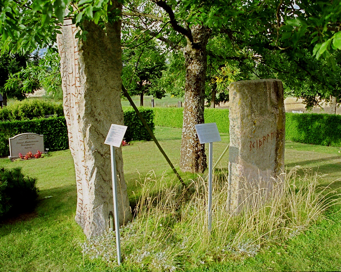 Runstenarna Ög 171 och Ög 172 på Skärkinds kyrkogård